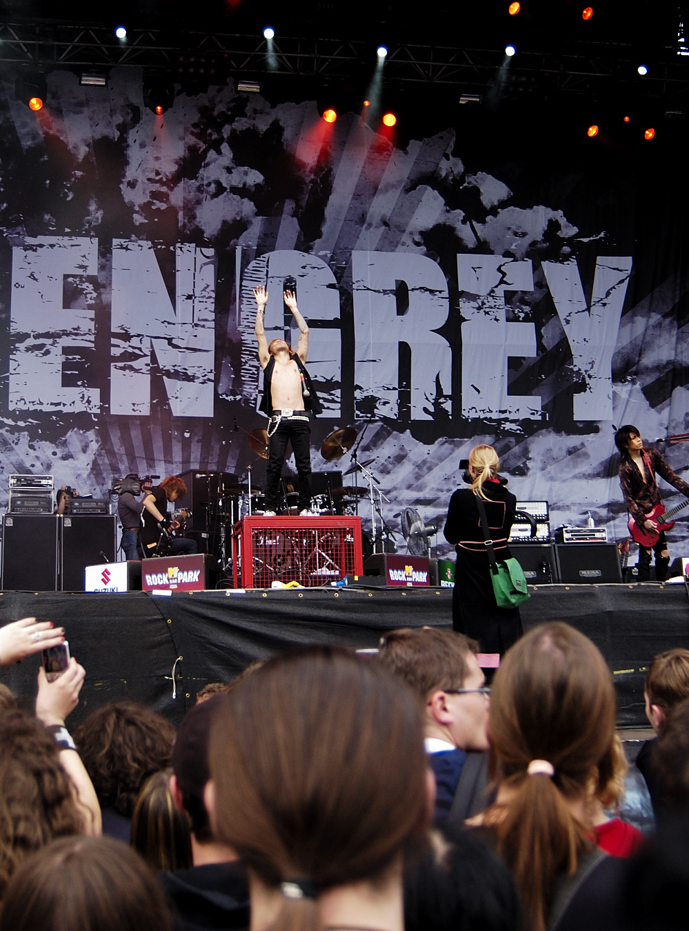 Autore: Deep_schismic Fonte: Flickr Data: 3 Giugno 2006 Descrizione: I Dir en Grey al rock im park 2006 Licenza: Creative-Commons-Attribution 2.0